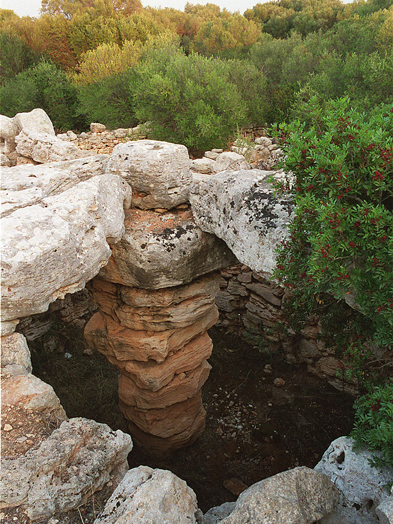 Techo del talayot de Hospitalet Vell, Mallorca.